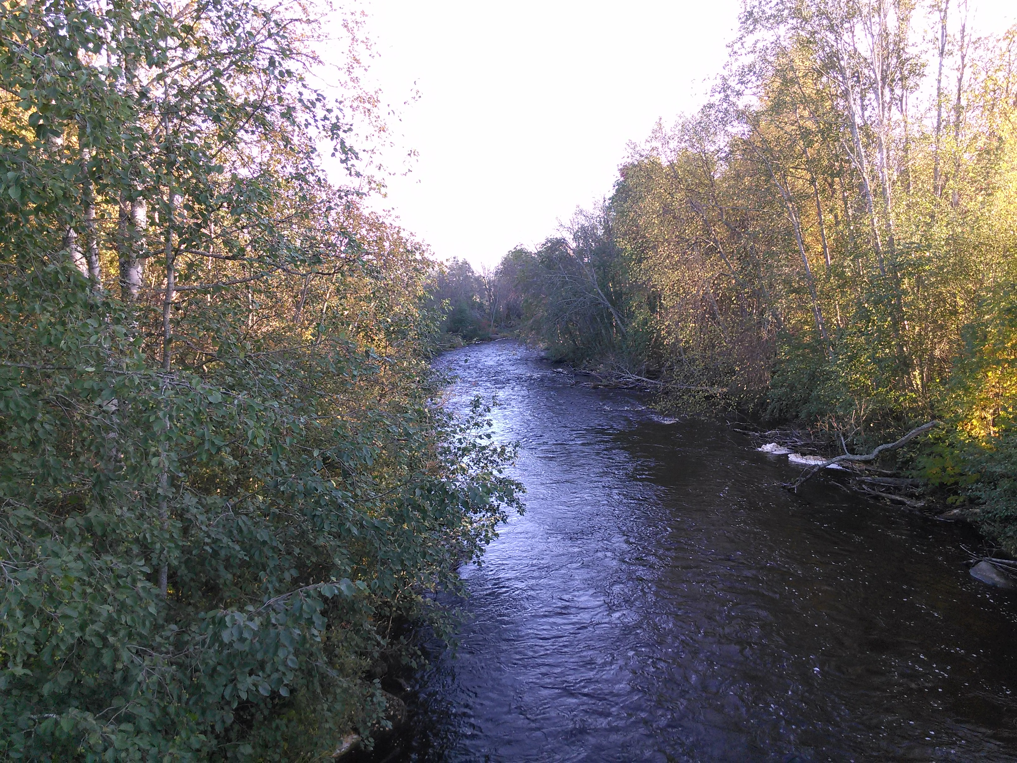 Fällforsån ifrån en bro i Ersmark.